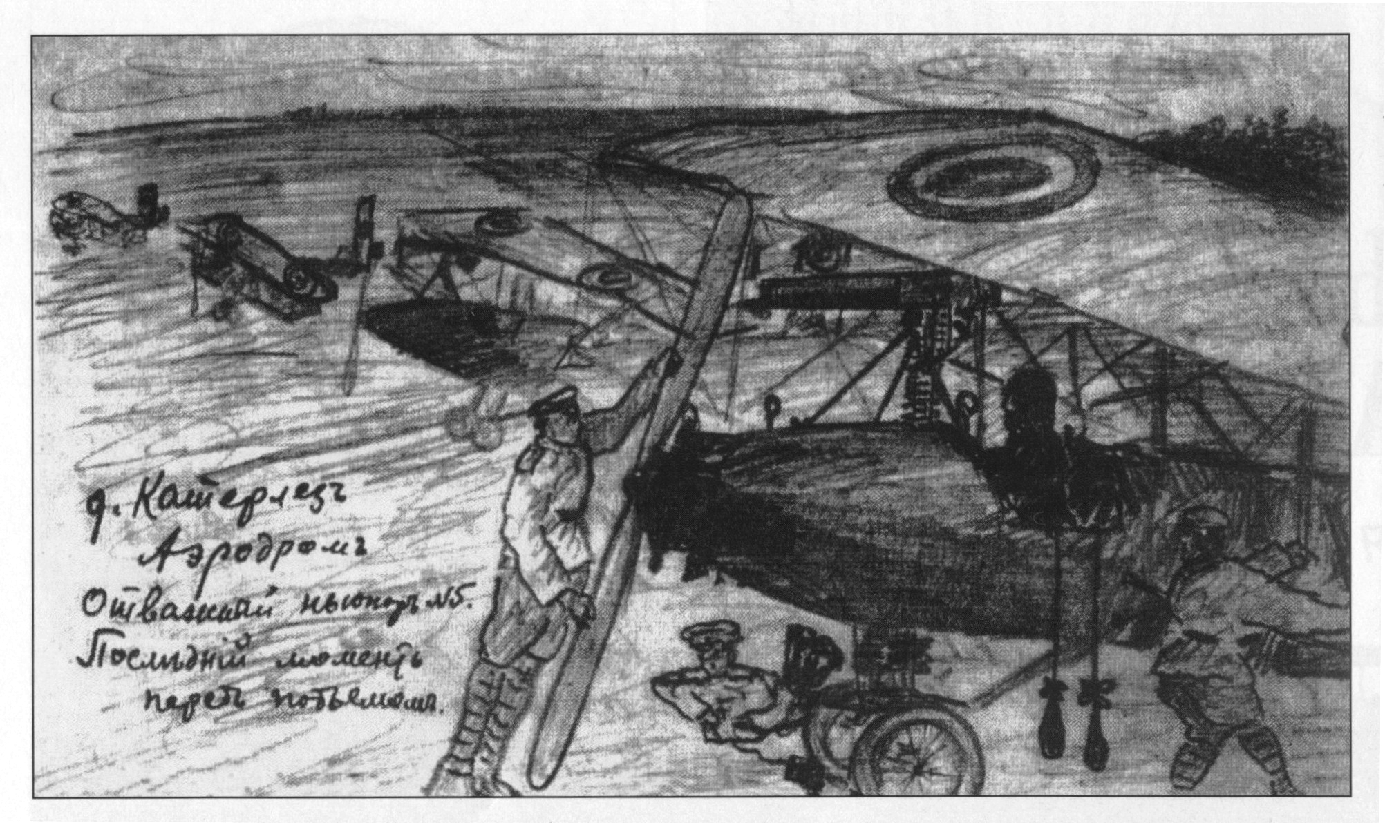 Рисунок, выполенный 21 июня 1920 года алексеевцем Борисом Павловым. На нём показаны четыре самолёта 3-го авиаотряда на аэродроме в селении Катерлез. Есаул Просвирин готовится вылететь на своем отважном «Ньюпоре» № 5.